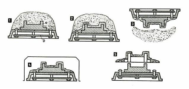 desmoldeo